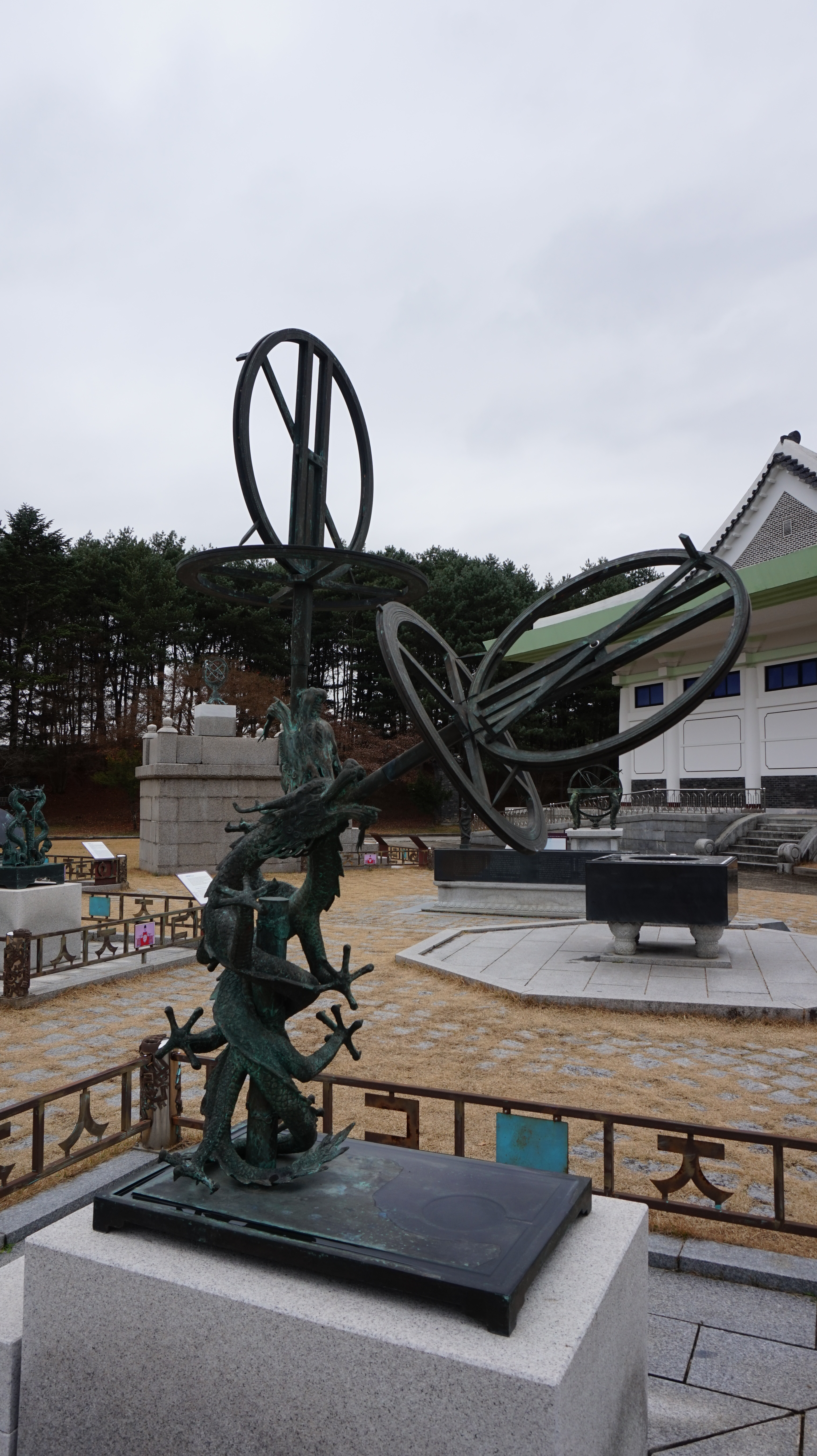 소간의 (1)